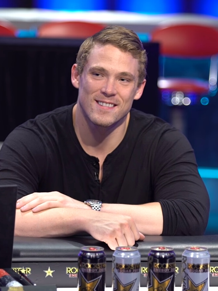 Alex Foxen nach dem Gewinn des High Roller des WPT L.A. Poker Classic